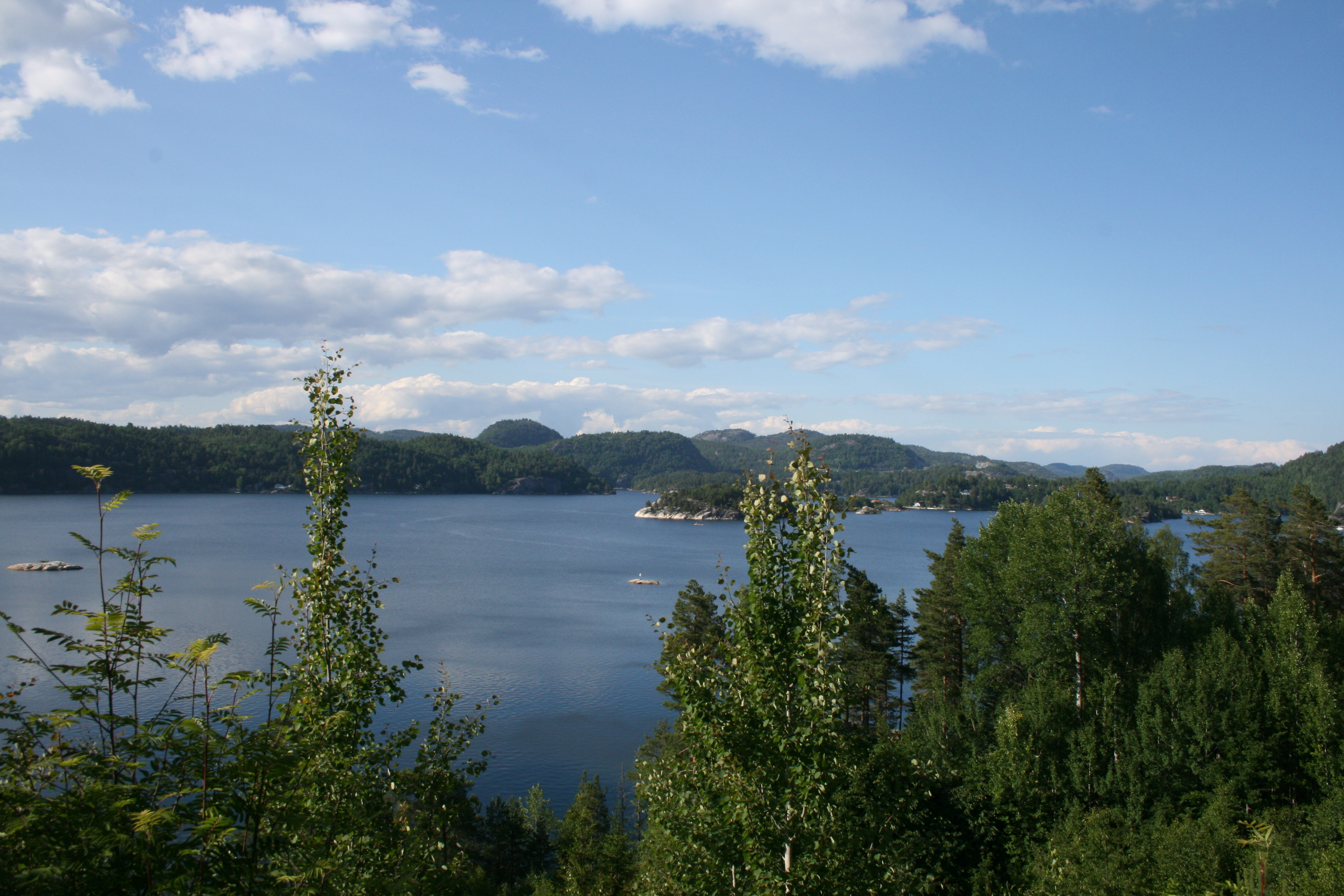 Sørfjorden i Søndeled